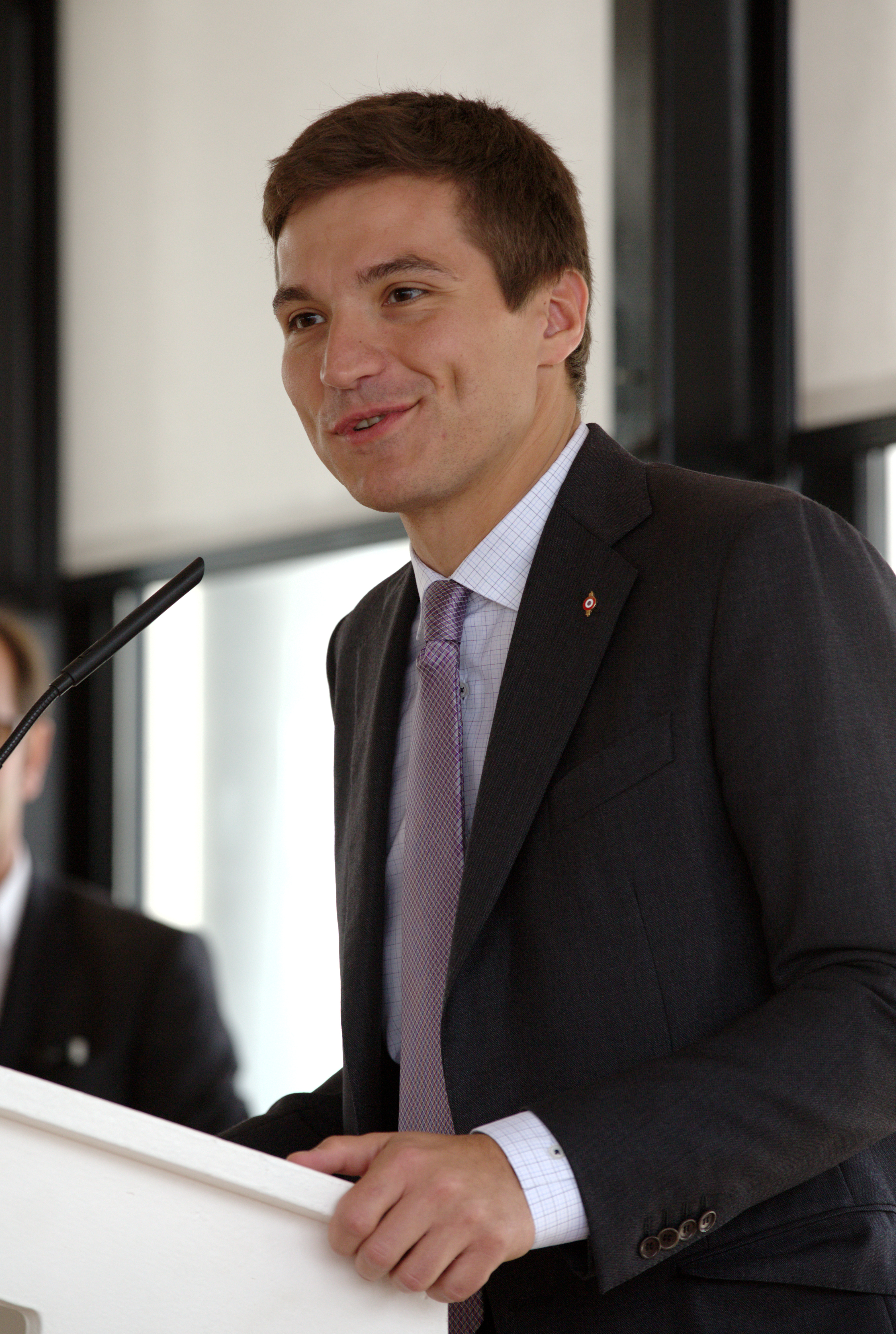 David Valence, maire de Saint-Dié-des-Vosges, lors de la remise du Prix Amerigo-Vespucci 2014.